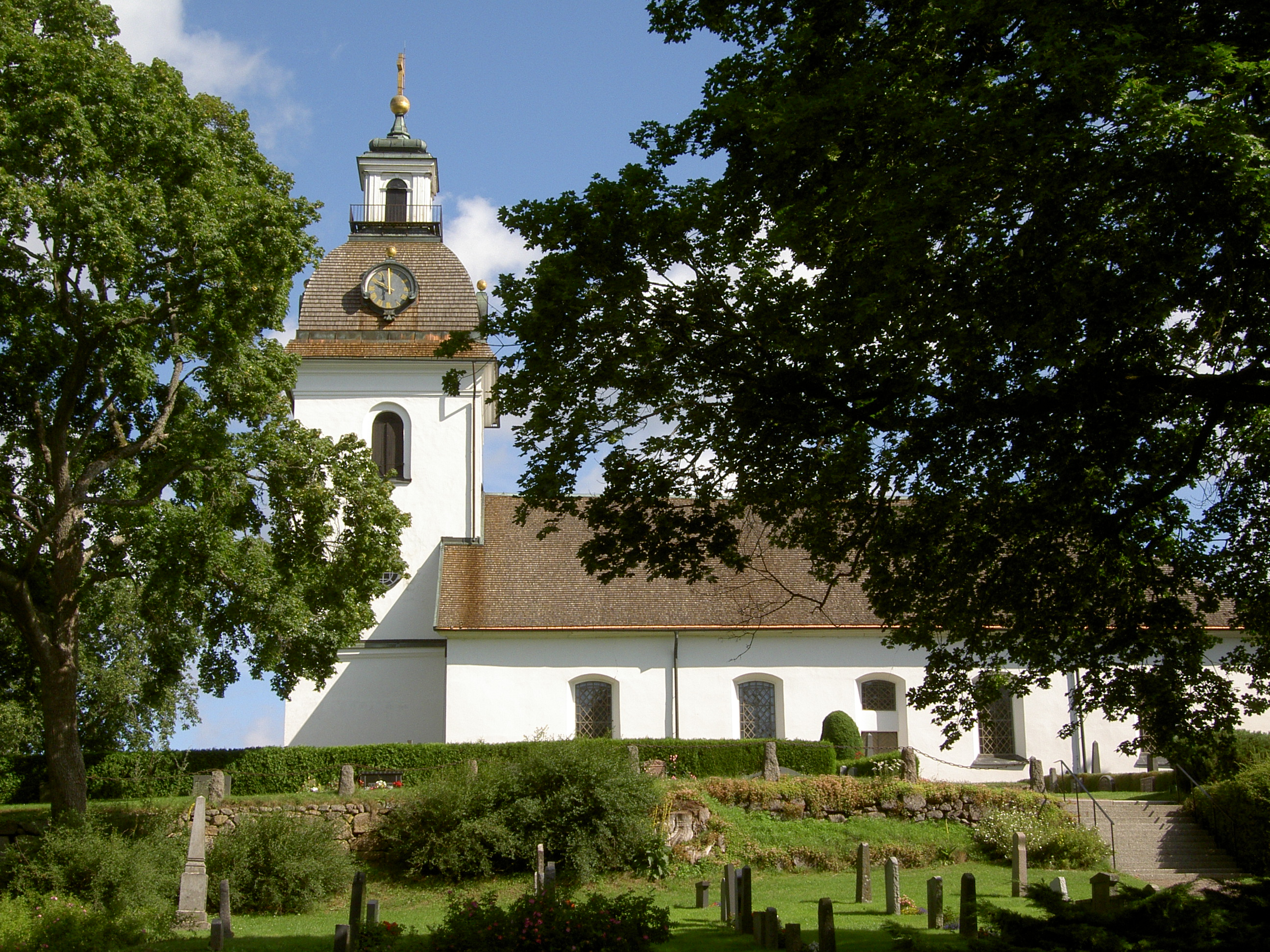 Tjärstads kyrka